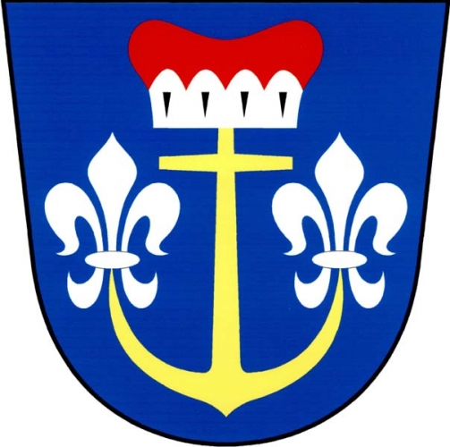 znak, Vraclav, okres Ústí nad Orlicí